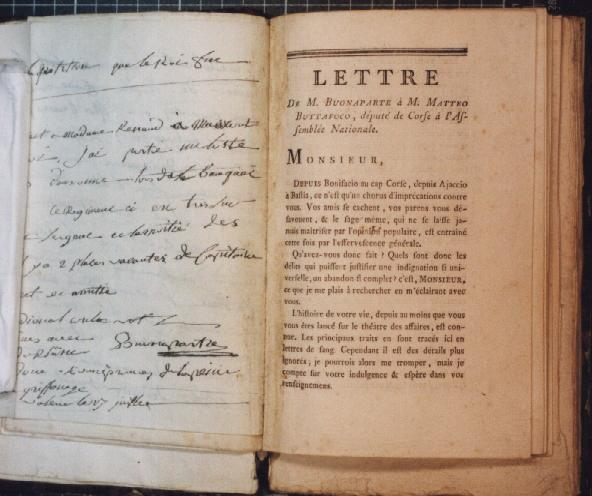 Napoléon Bonaparte. La lettre au député corse Matteo Buttafoco imprimée à Dole lors de son séjour à l’École royale d’artillerie à Auxonne. Avec l'aimable autorisation de la bibliothèque de Dole (Jura).